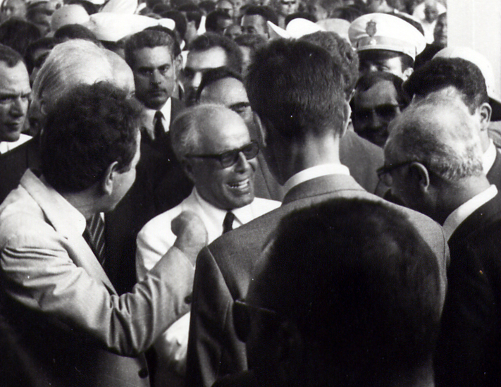 Bourguiba à Mahdia le 11 aout 1967